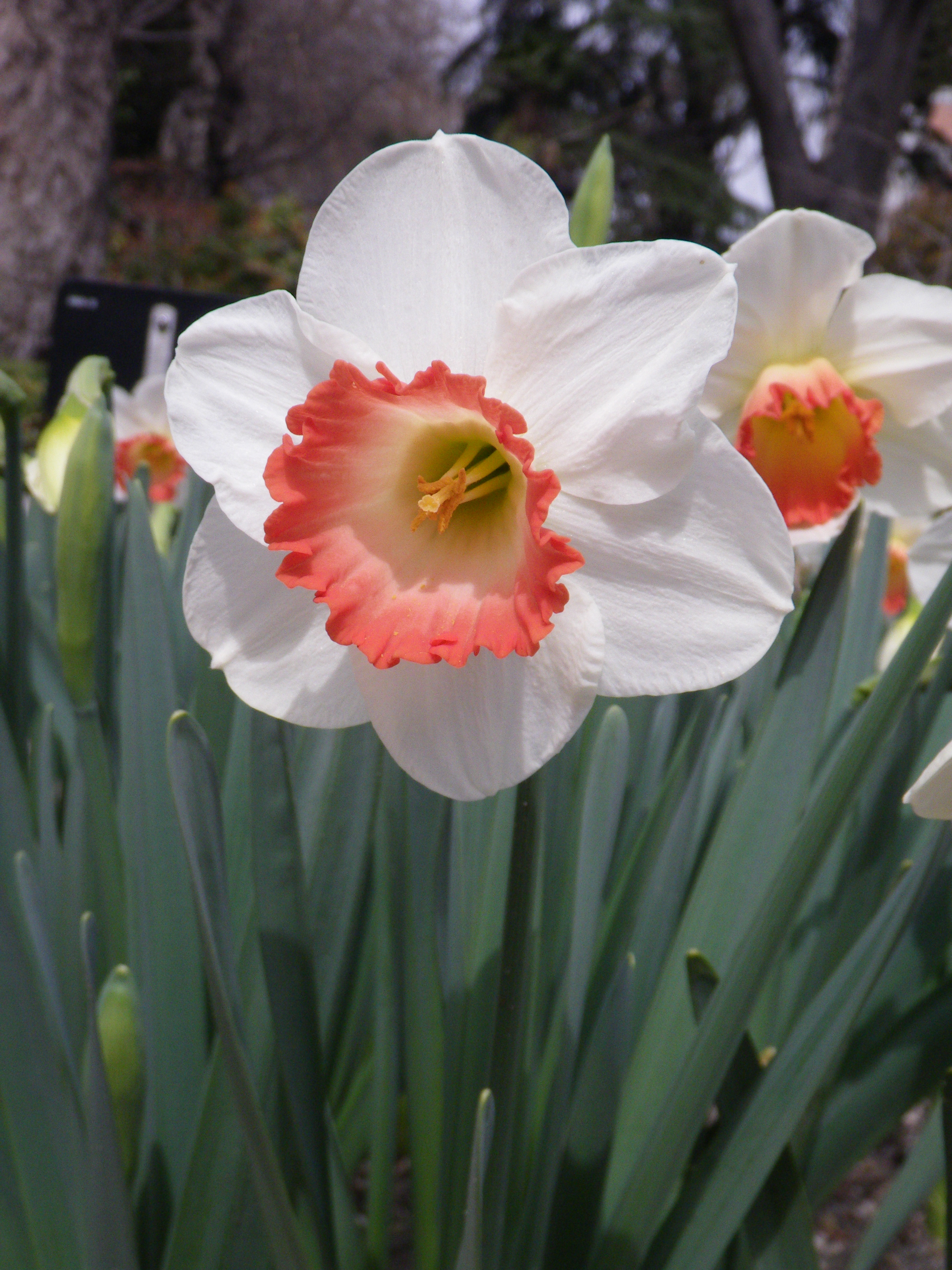 Narcissus 'Pink Charm', div. 2. Real Jardín Botánico, Madrid, España.